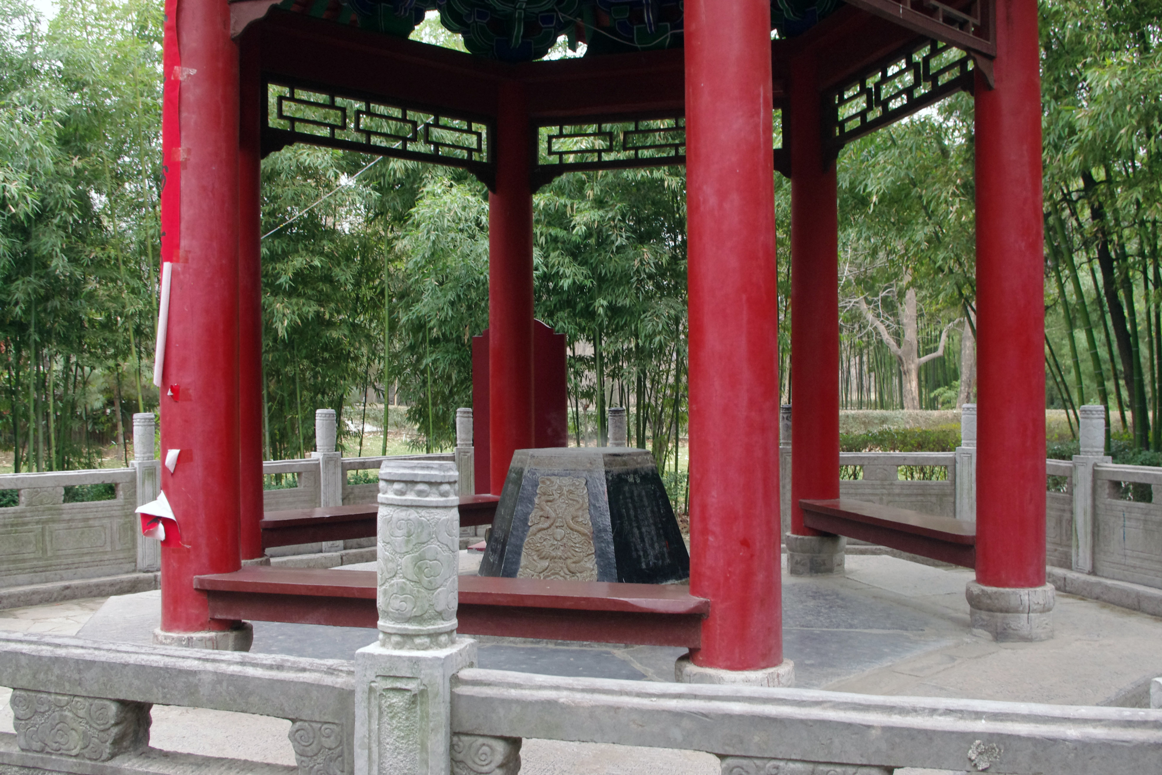 关中八景-草堂烟雾